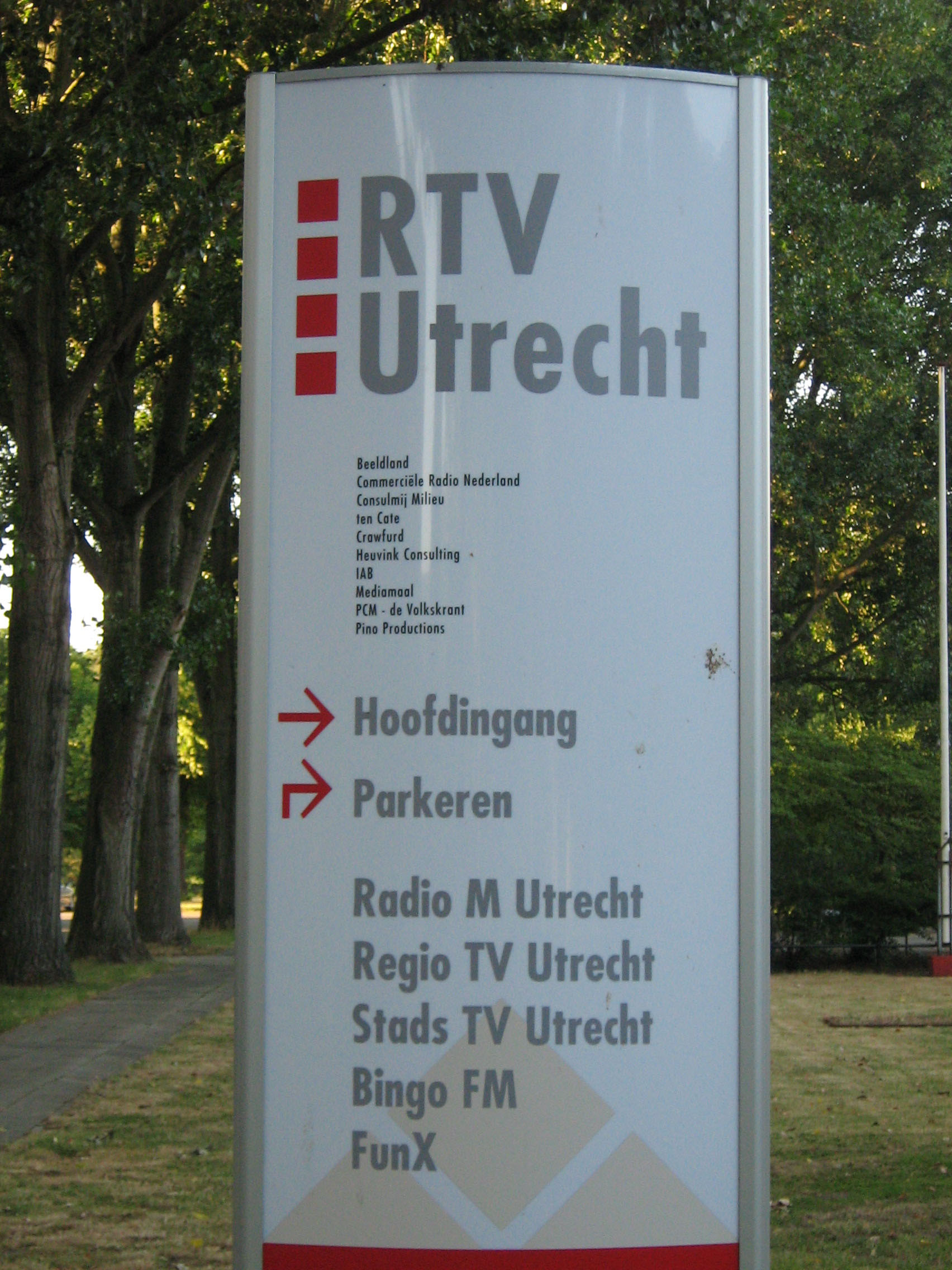 Foto van het bord bij ingang RTV Utrecht.